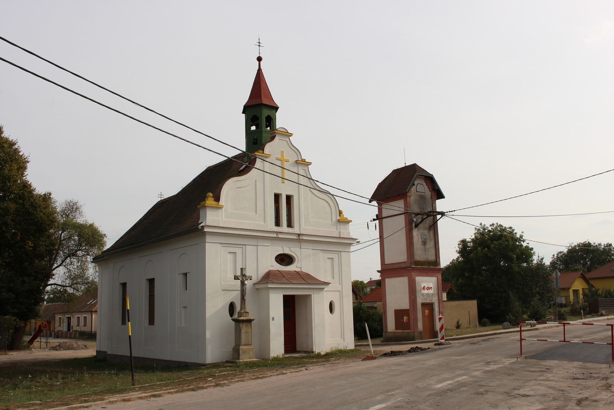 Bojanovice, okres Znojmo, Jihomoravský kraj, kaple svatého Jana Nepomuckého